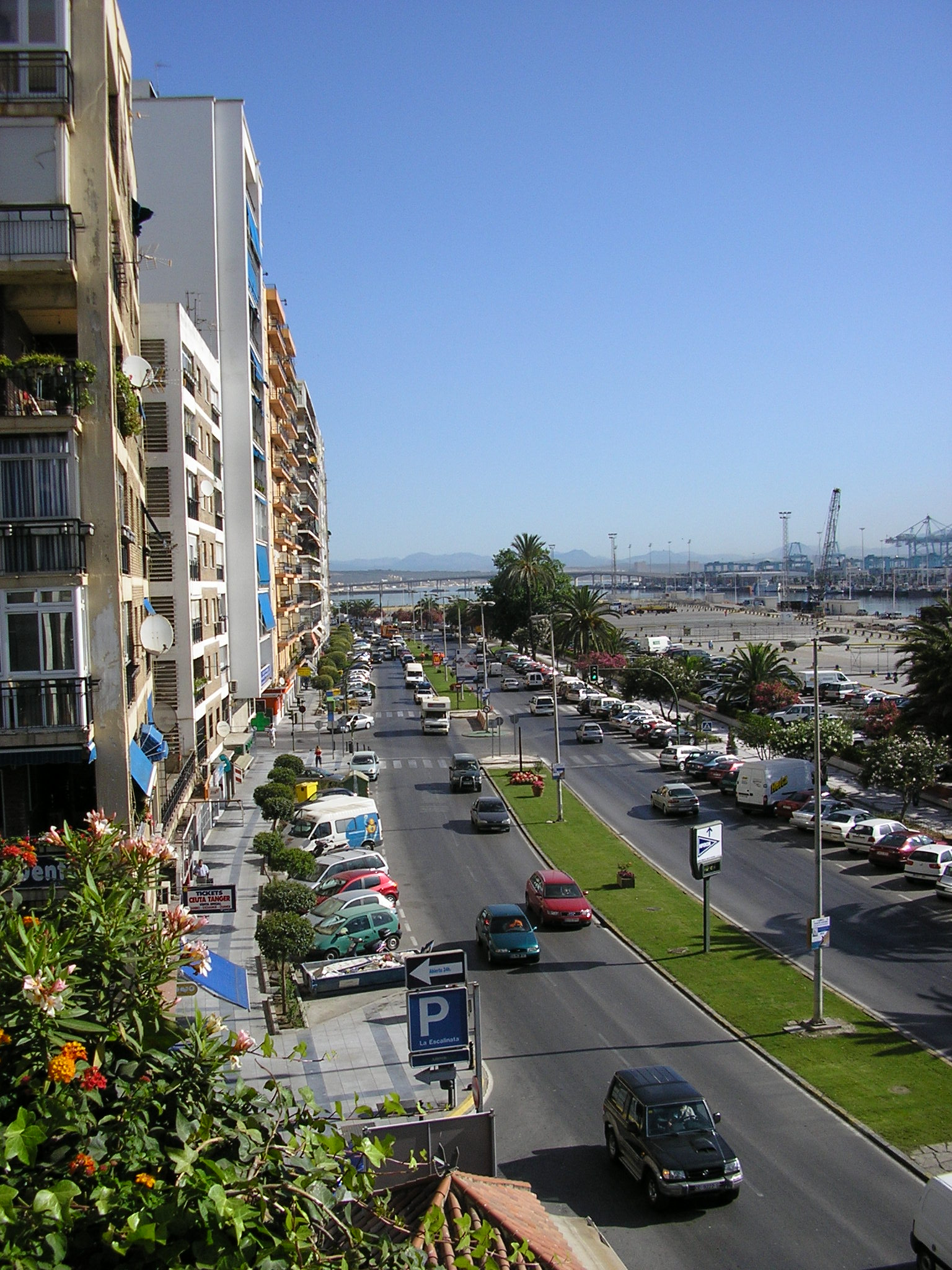 Paseo Marítimo de Algeciras Fotografía de realización propia, mayo de 2007